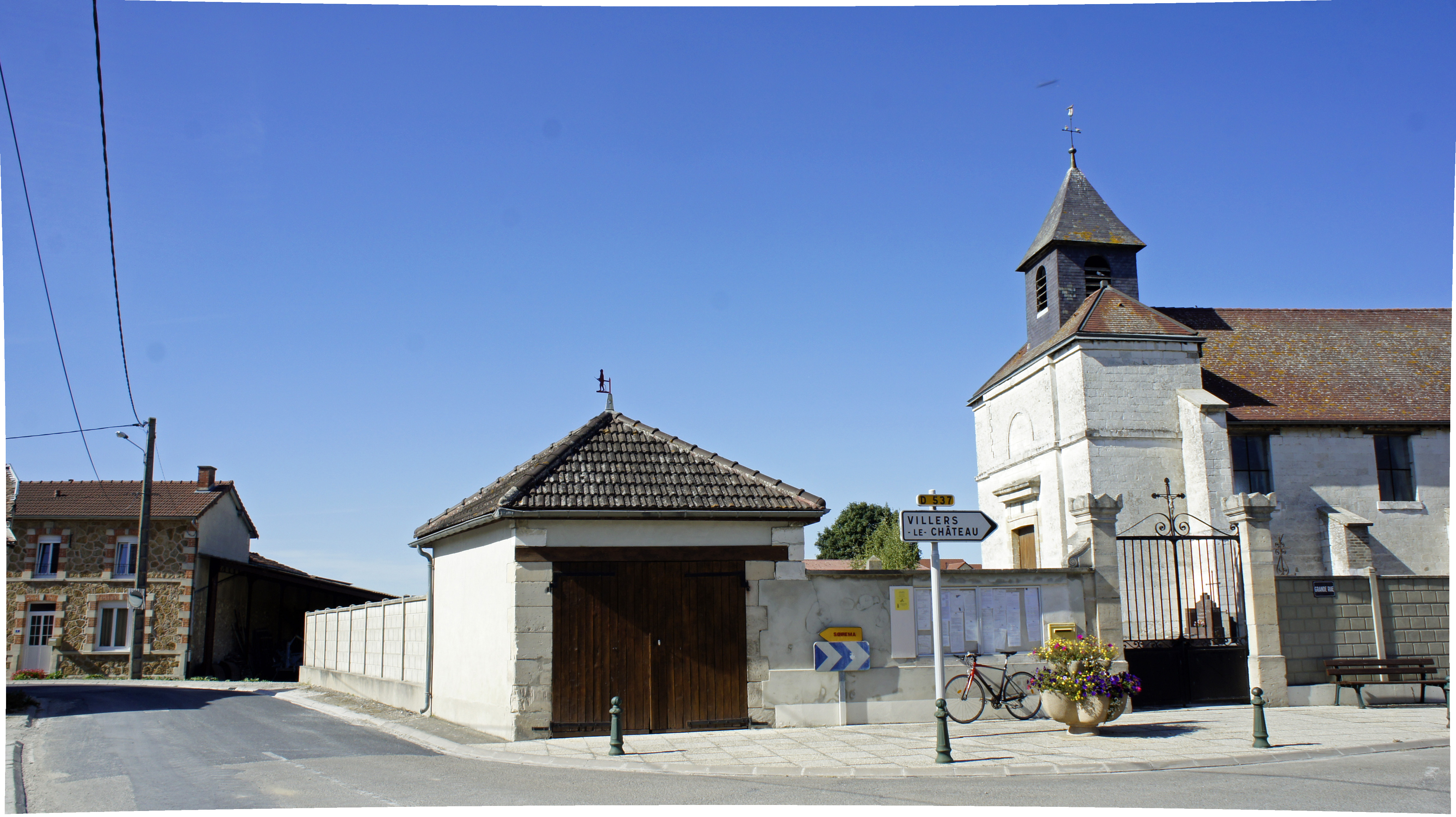 Vue de l'église de St-Pierre_et un local de pompiers.